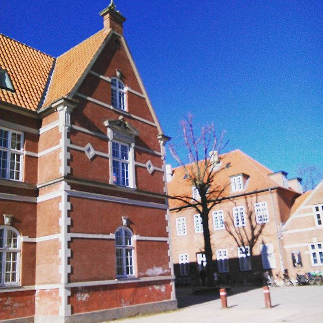 Karens Minde. Wikiwednesday 4.5. 2016